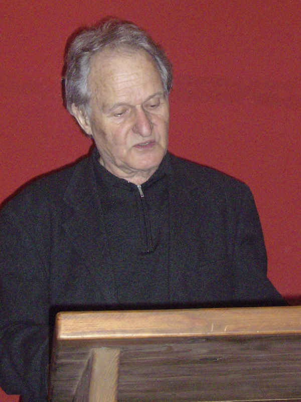 Gerhard Vinnai (* 1940 in Stuttgart), deutscher Sozialpsychologe, bei einem Vortrag in der Evangelischen Studentengemeinde Bremen.